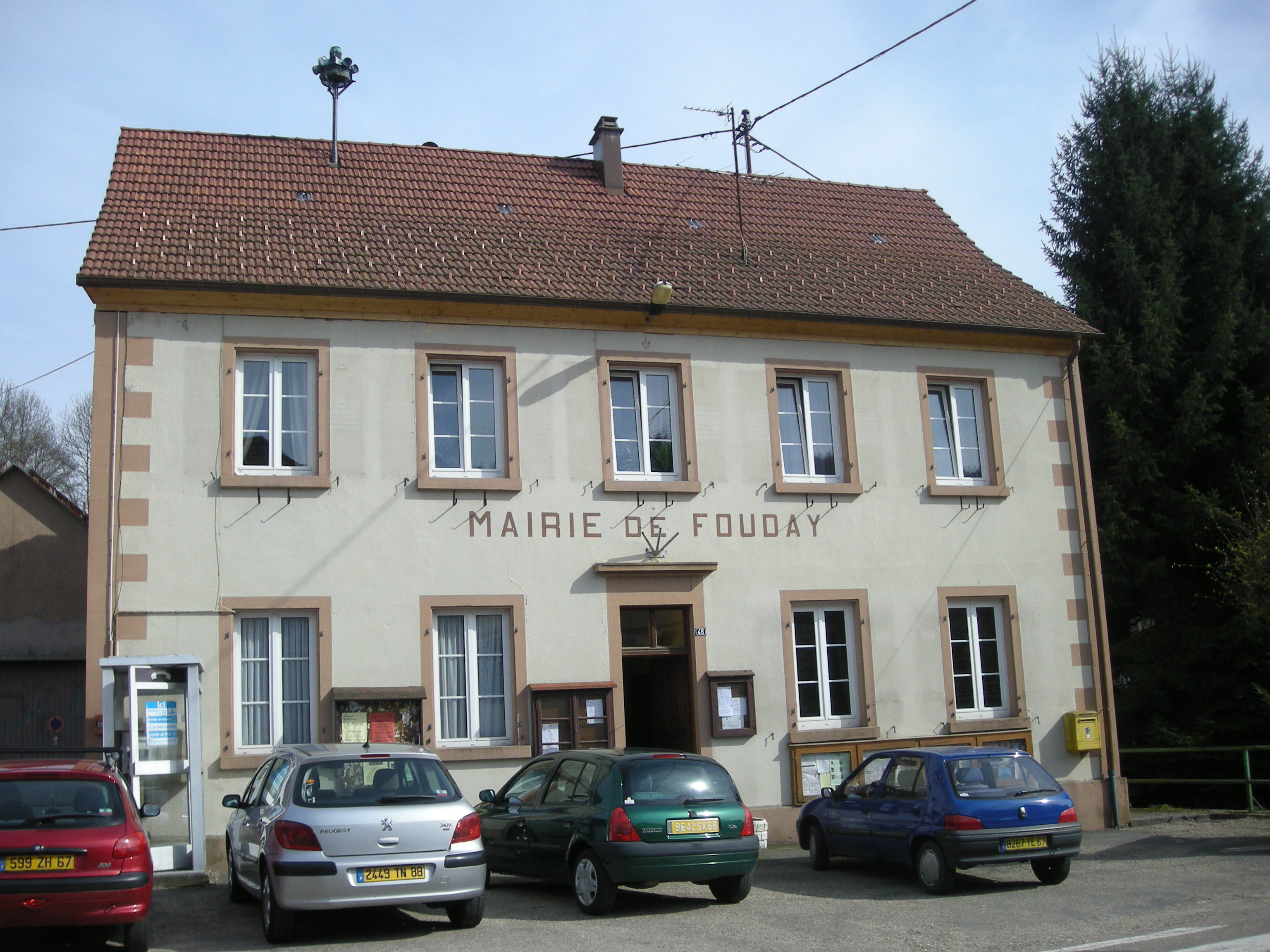 La mairie de Fouday (Bas-Rhin, Alsace)